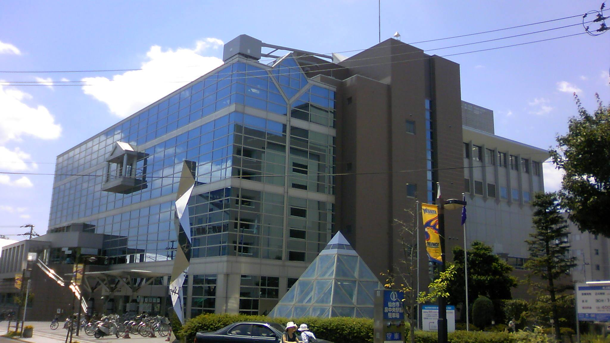 仙台市泉図書館